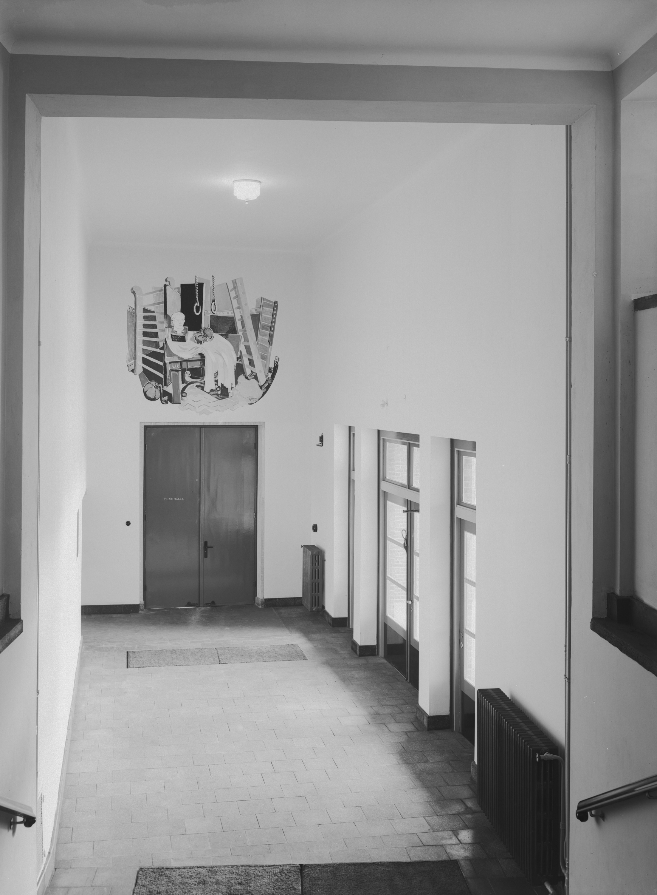 Schule Adlerstrasse (Hamburg-Barmbek): Flurteil mit Wandzeichnung SchumacherWV Nr. 273